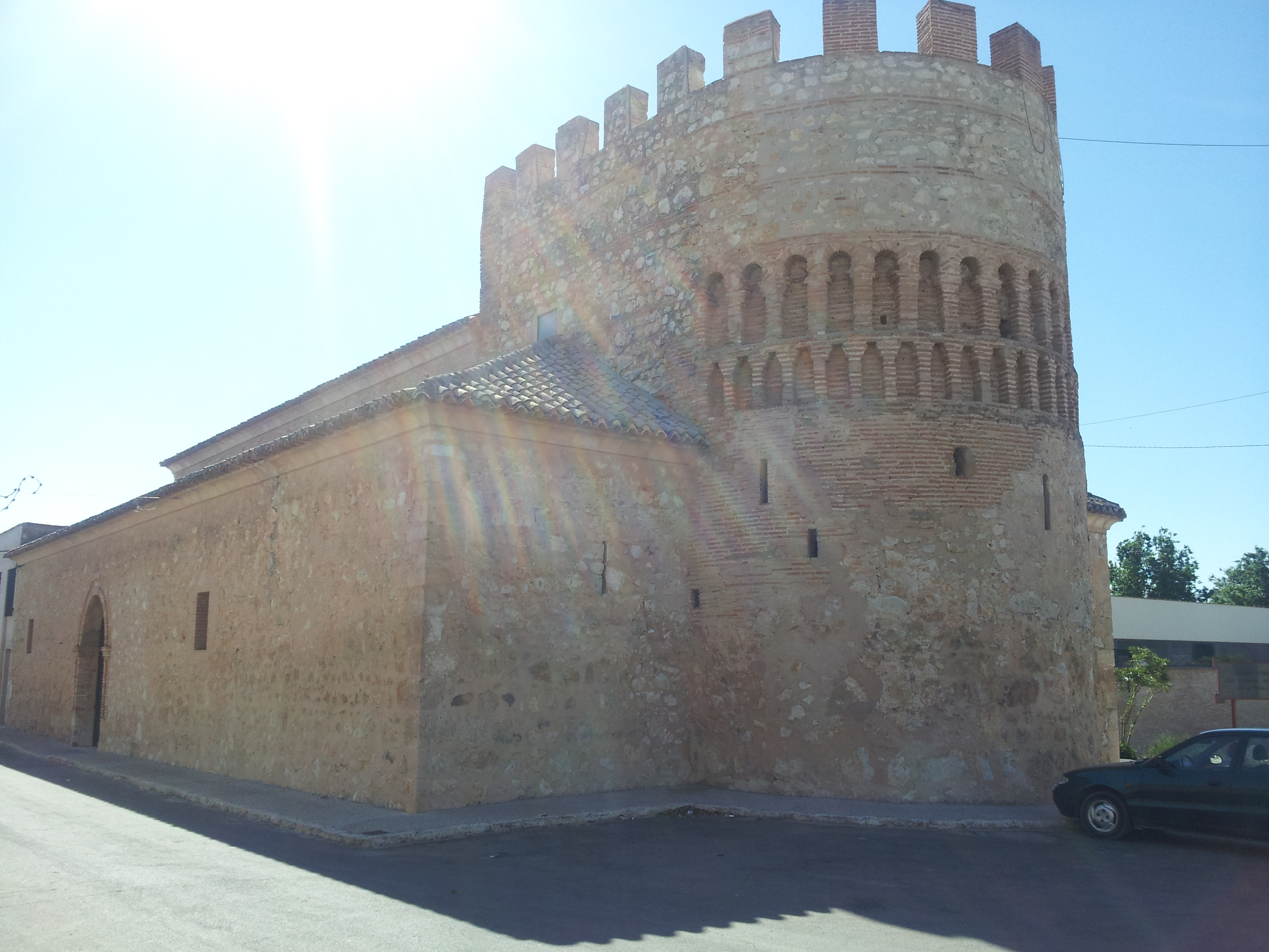 Iglesia de Arenas de San Juan, Monumento Histórico Nacional, fue primero Torre de observación romana al lado de la vía romana hacia Tarragona, después mezquita y posteriormente Iglesia